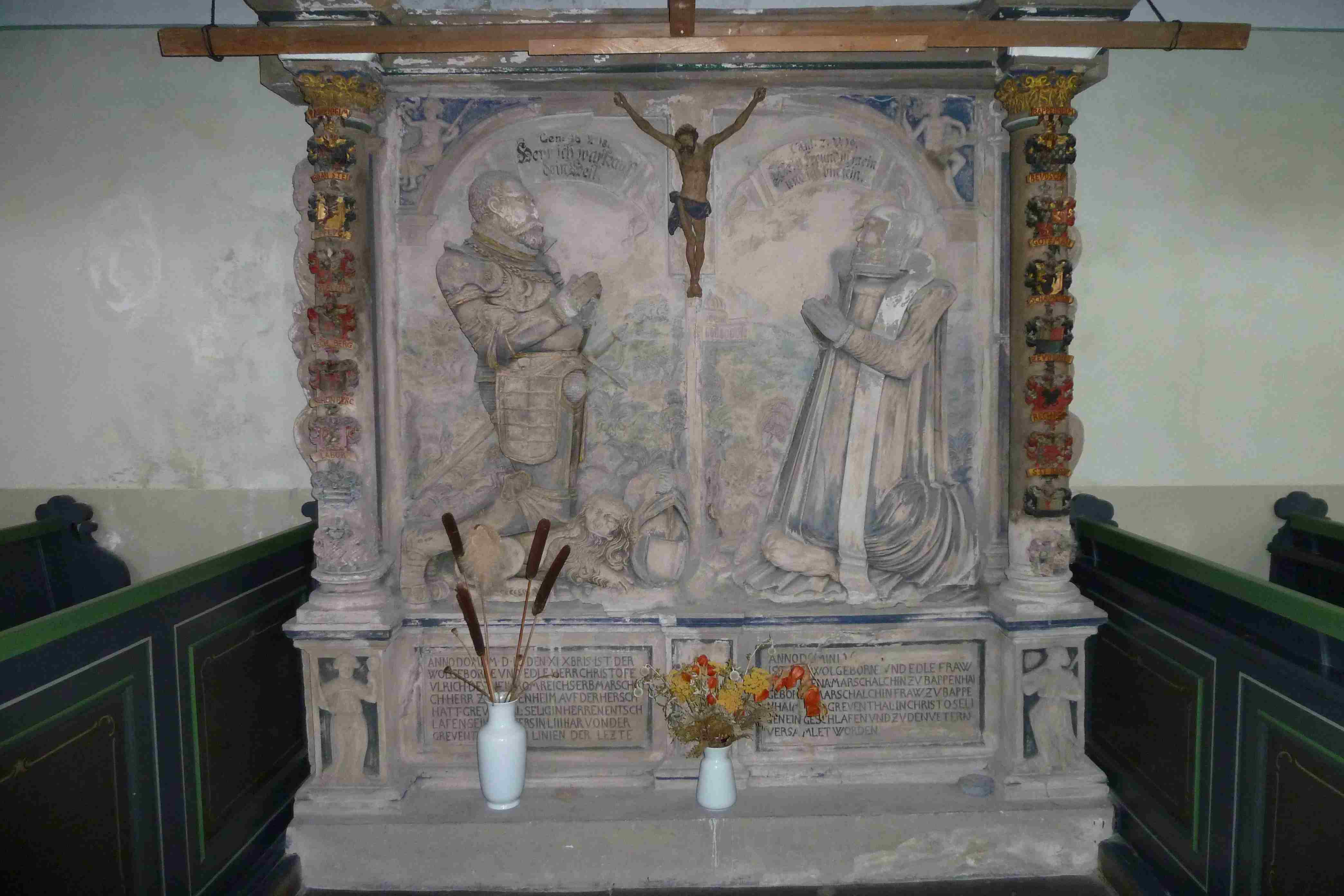 Grabmal des letzten regierenden Grafen von Pappenheim der Gräfenthaler Linie, Christoph Ulrich († 11. Dez. 1599) und seiner Frau Magdalena in der Stadtkirche Gräfenthal